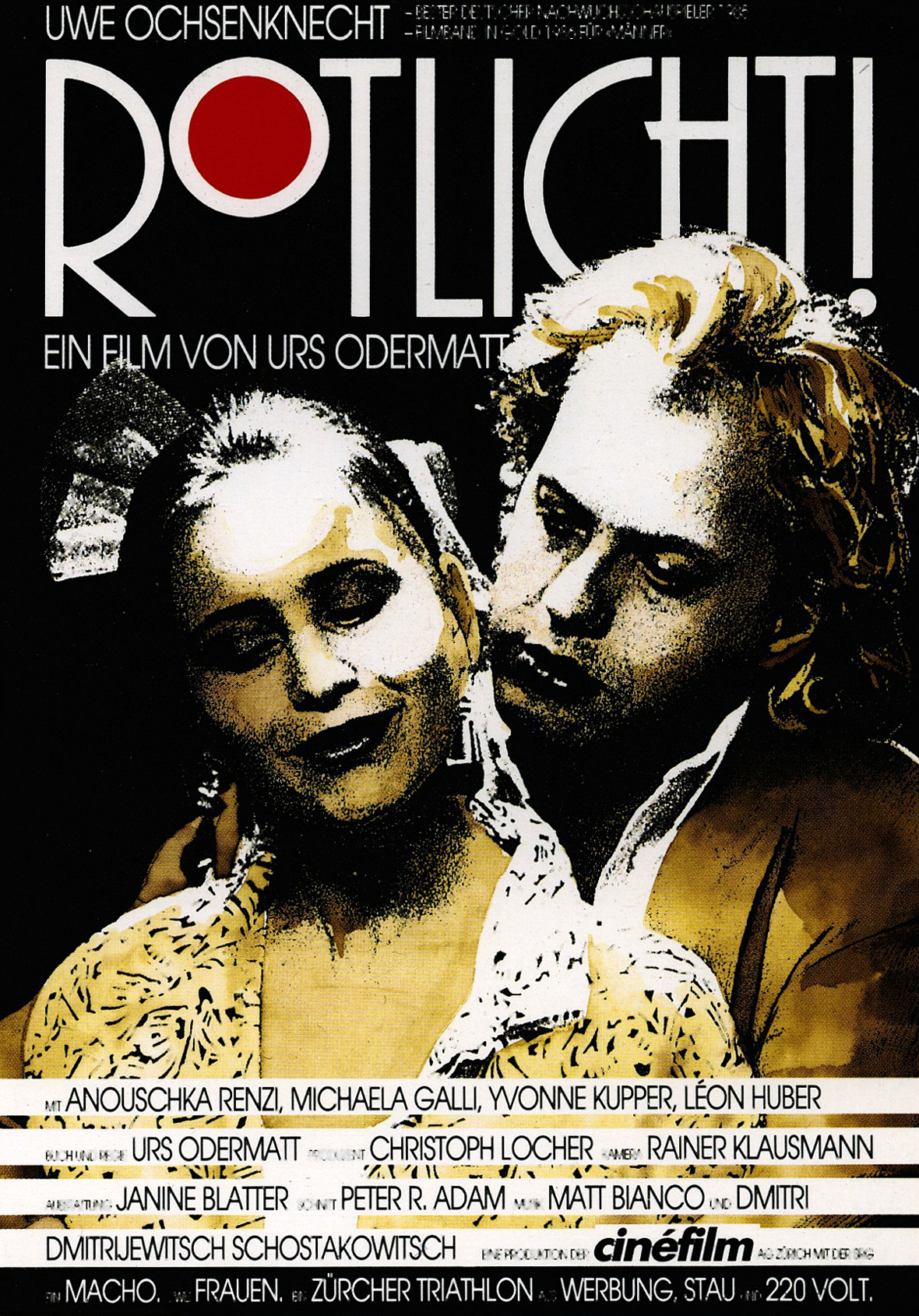 Filmplakat Rotlicht! von Urs Odermatt. Michaela Galli (links), Uwe Ochsenknecht (rechts), Cinéfilm AG